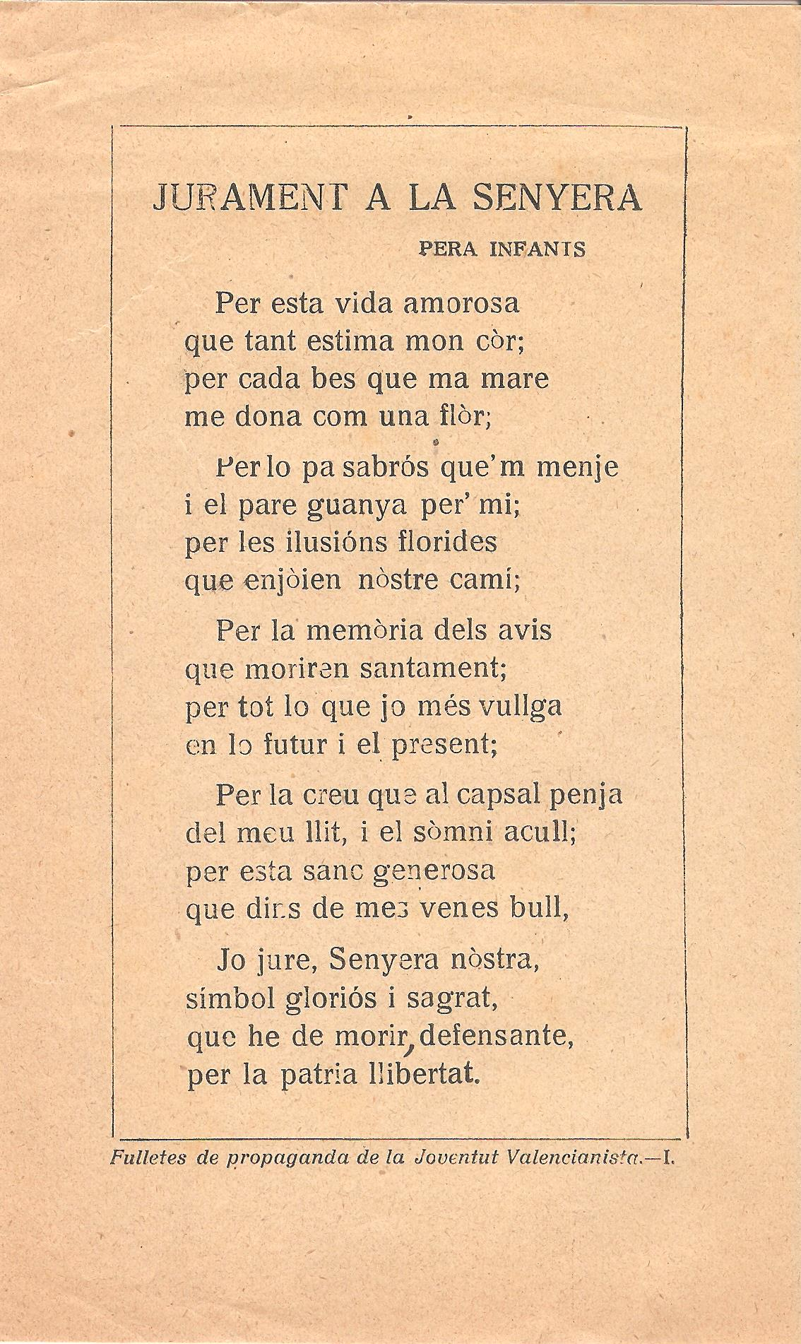 Full volant amb poesia anònima publicada per Joventut Valencianista